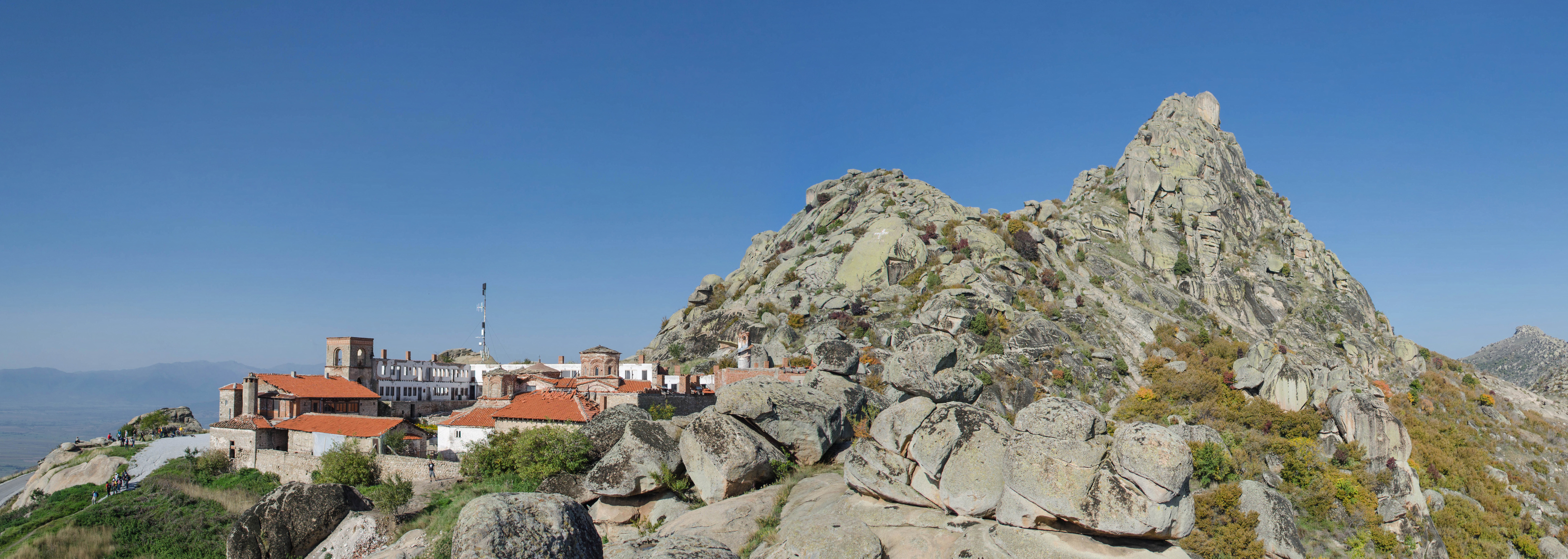 Манастир „Успение на Пресвета Богородица“, Трескавец во близина на Прилеп